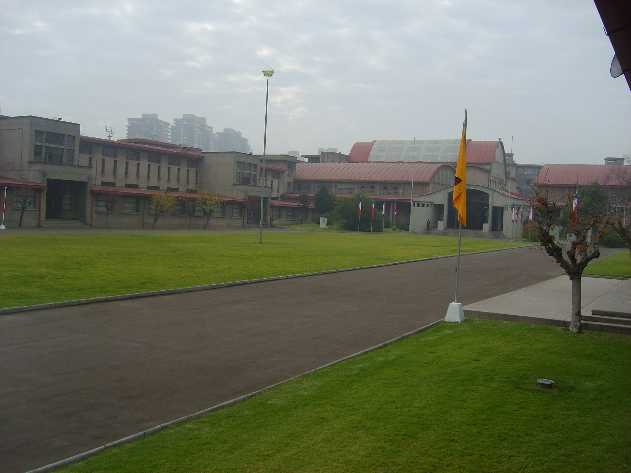 Fotografía del Patio Alpatacal de la Esc. Militar